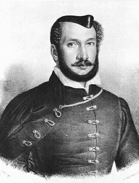 Forrás: Jósika Miklós